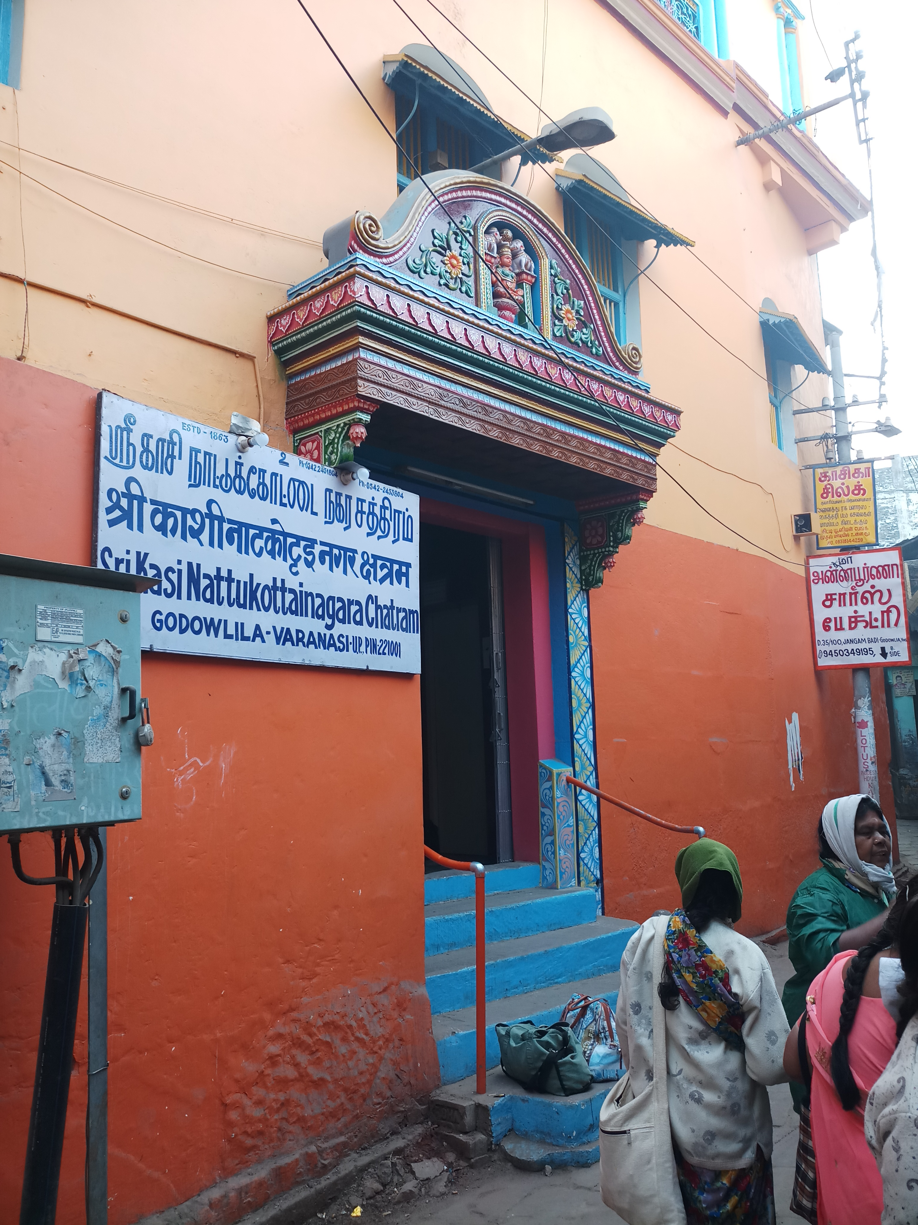 காசி நாட்டுக்கோட்டை நகரச் சத்திரம்